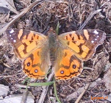 Mariposa colorada, Chile